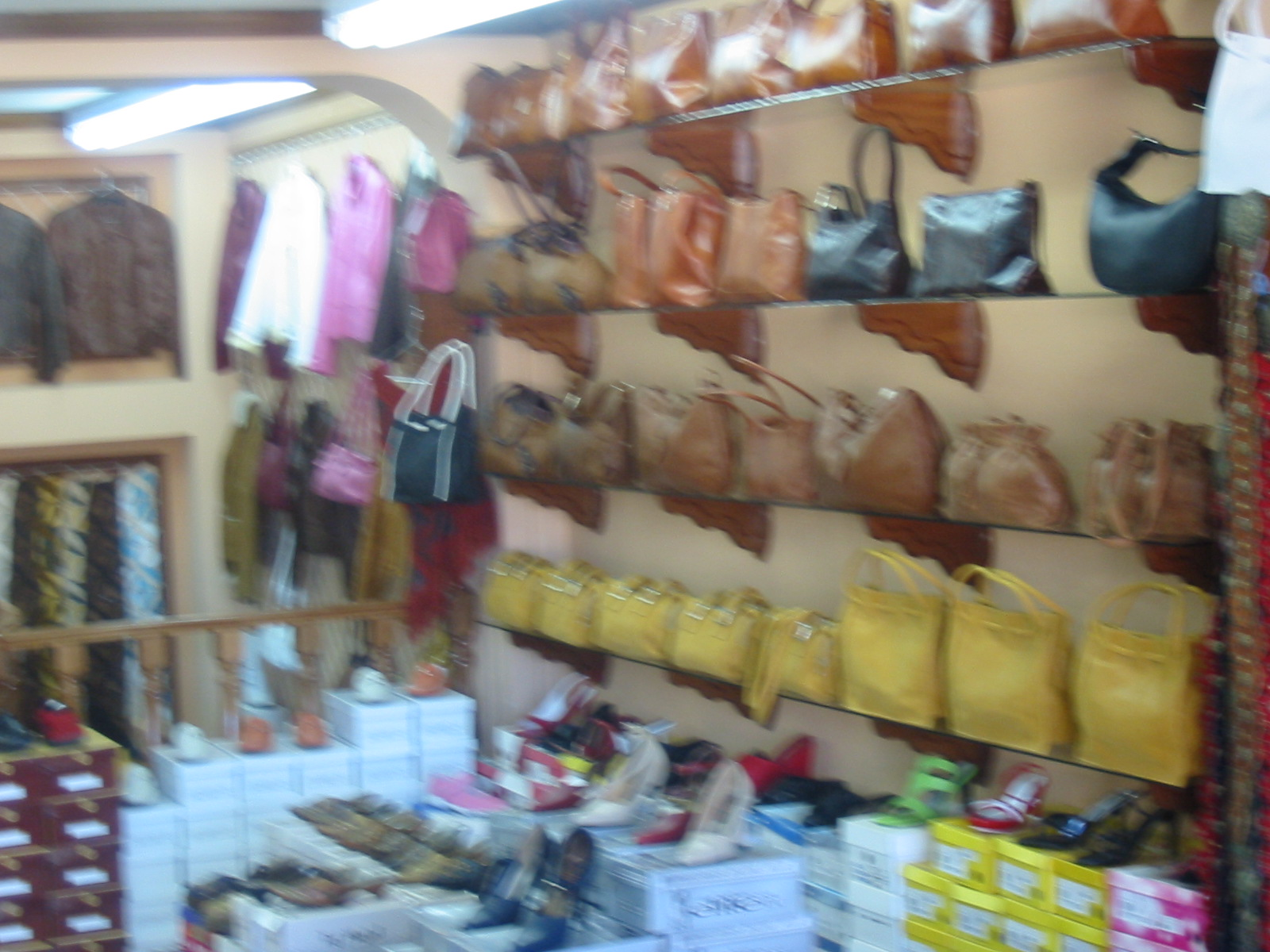 Quisapincha Town - Famous for his leather sales. El pueblo de Quisapincha. Famoso por sus articulos de cuero.